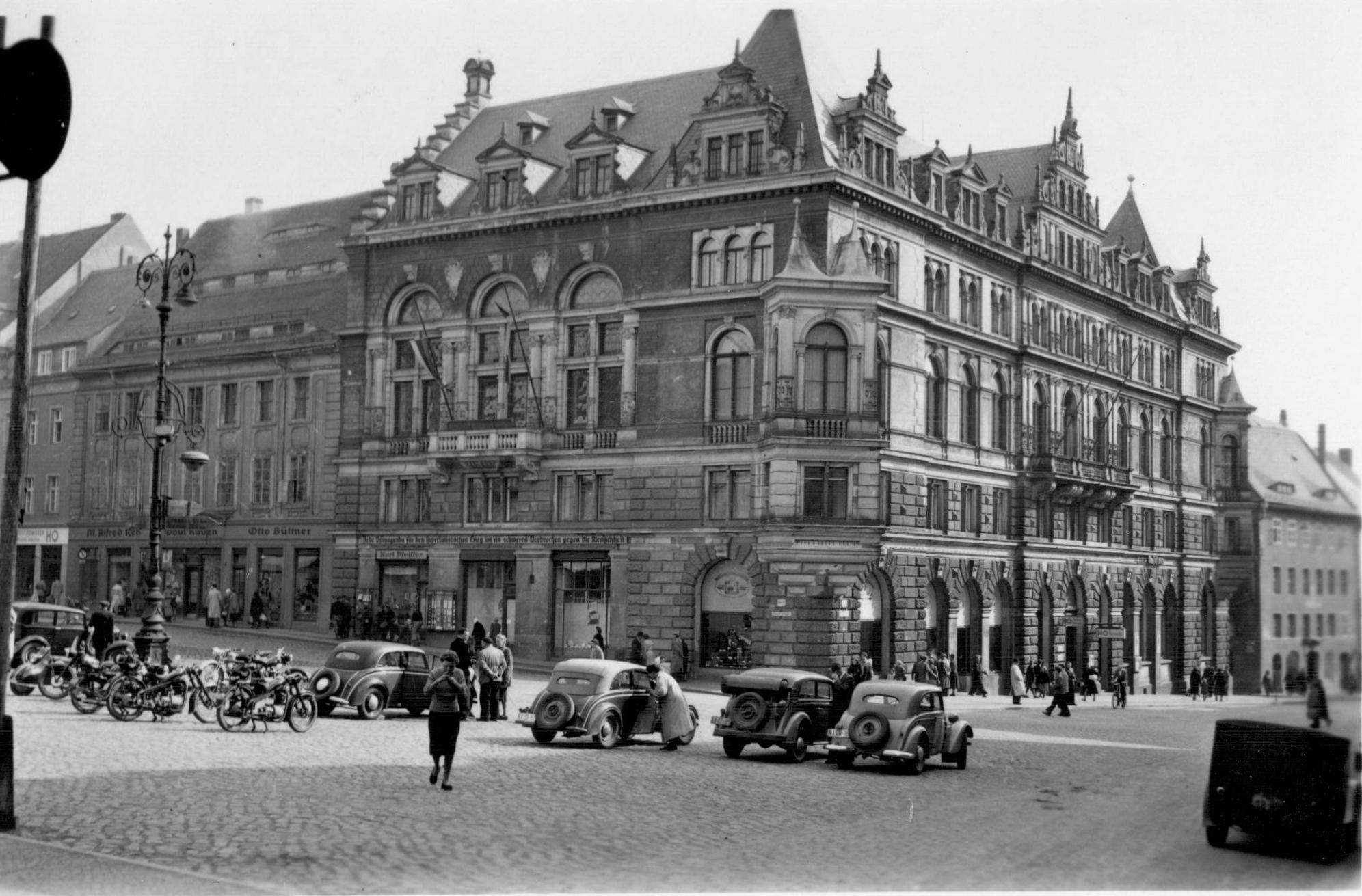 Hornjoserbsce: Kupnica na Hłownym torhošću w Budyšinje wokoło 1954